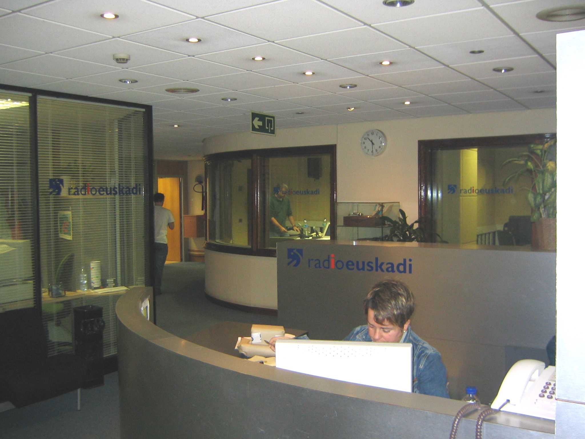 Radio Euskadi en Bilbao, Vizcaya, País Vasco, España.